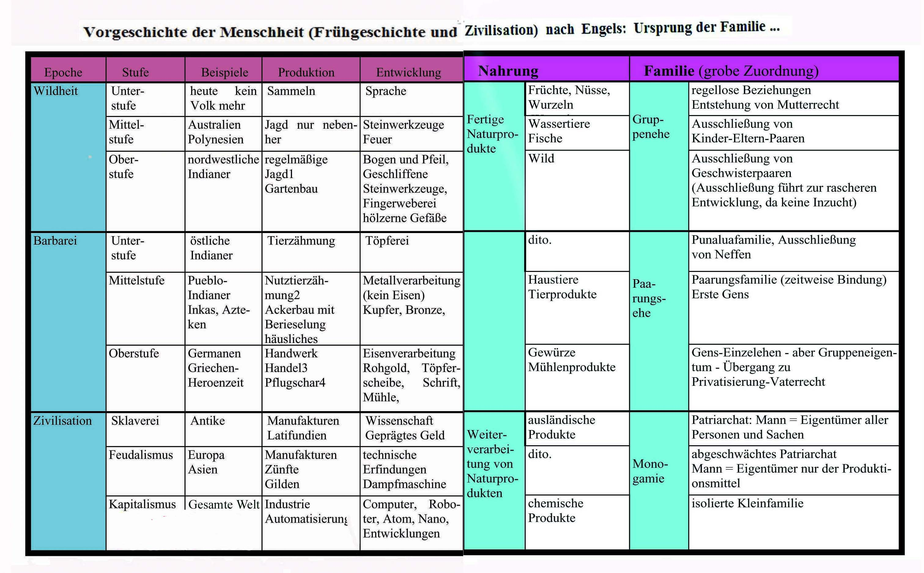 Die Tabellenkurzform zeigt in der Übersicht, wie sich mit der Produktionsweise auch die Produktionsverhältnisse, die Familienverhältnisse und die Esskultur änderten. Ein schönes Beispiel für eine heute noch bestehende Paarungsfamilie in einer matrilinearen Gesellschaft (älterer Ausdruck aus der Aufklärung „Matriarchat“) zeigt der WDR-Kurzfilm (5 Min.) über das Volk der Mosuo in China.